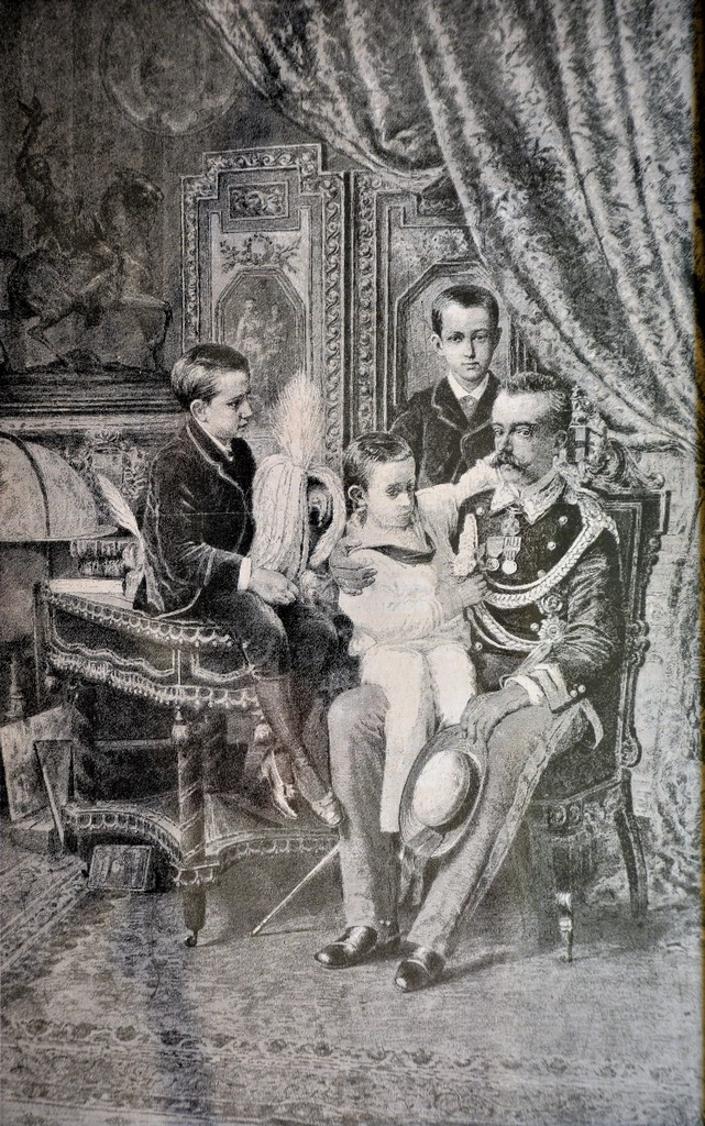 Il principe Amedeo ed i suoi figli, Giacomo Di Chirico (1844-1883)